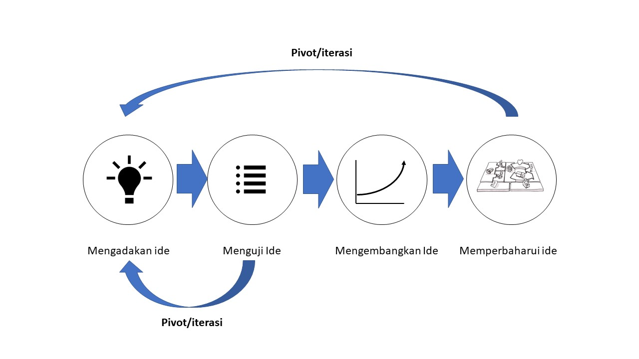 TIga langkah sederhana melakukan inovasi